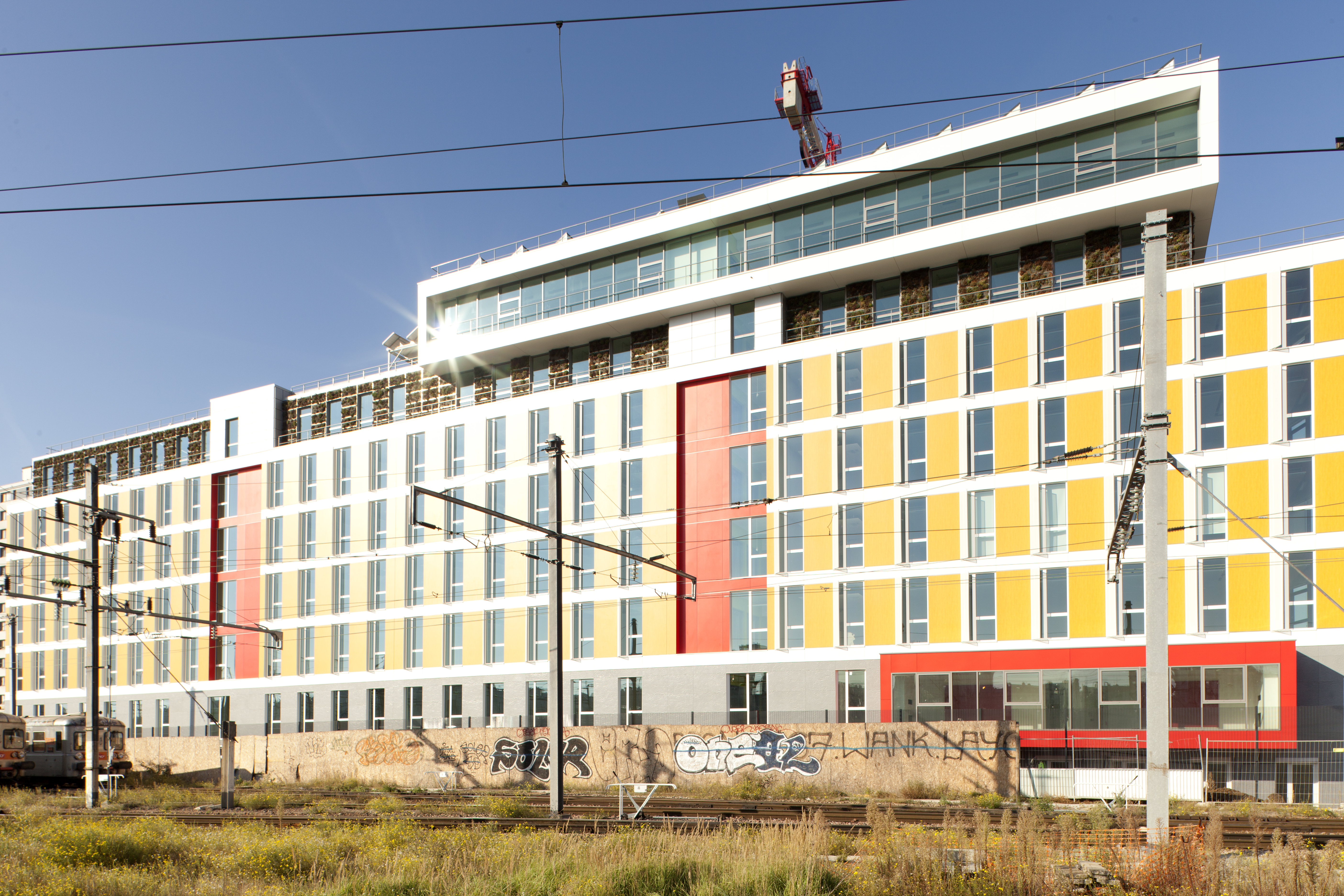 Photographie de l’incubateur d’entreprises PRINE, rue René Clair, Paris XVIIIe, projet ama architecture/Thierry Melot de 2011